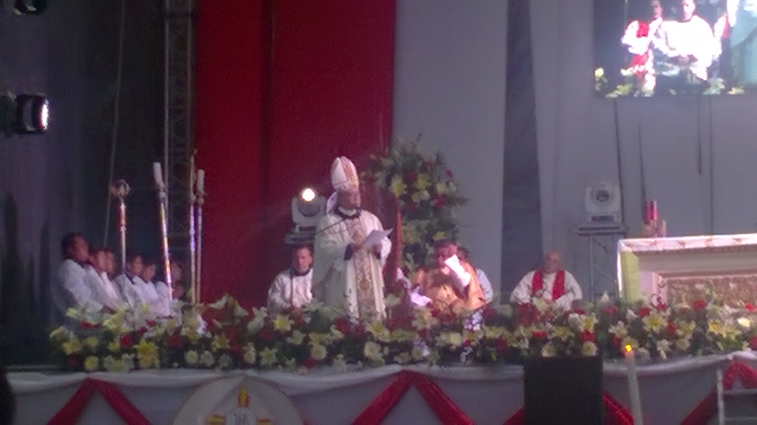 Mons. Francisco Moreno Barrón predicando